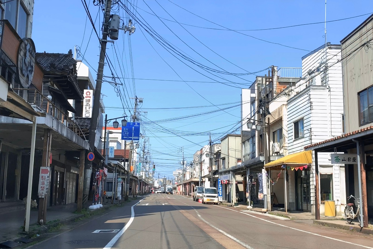 三条市「本町一丁目」バス停付近（2020年4月）新潟県道331号三条下田線